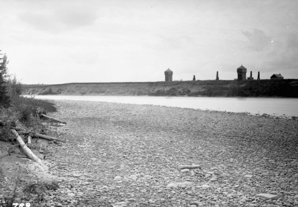 Ruines de Rocky Mountain House vues de la rive sud de la rivière Saskatchewan - 1884. Photographie prise par Joseph B. Tyrrell. Source: Geological Survey of Canada / Library and Archives Canada / PA-038031 Copyright: expiré. Domaine public.